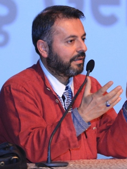 Mevlana İdris